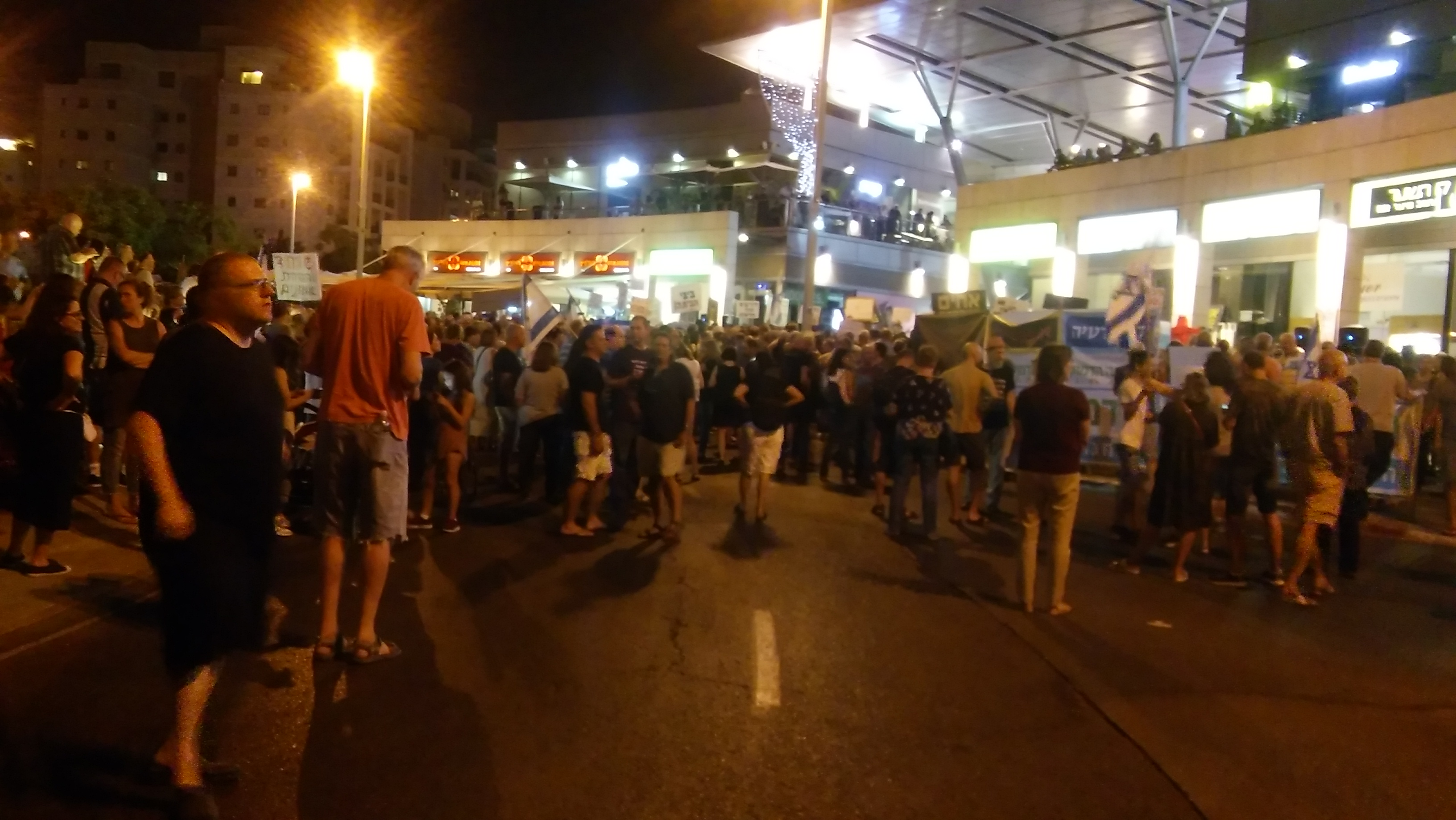 הפגנות נגד היועמ"ש פ"ת